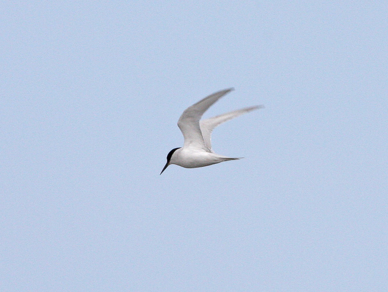 Damara Tern Sternula balaenarum, Swakopmund to Walvis Bay